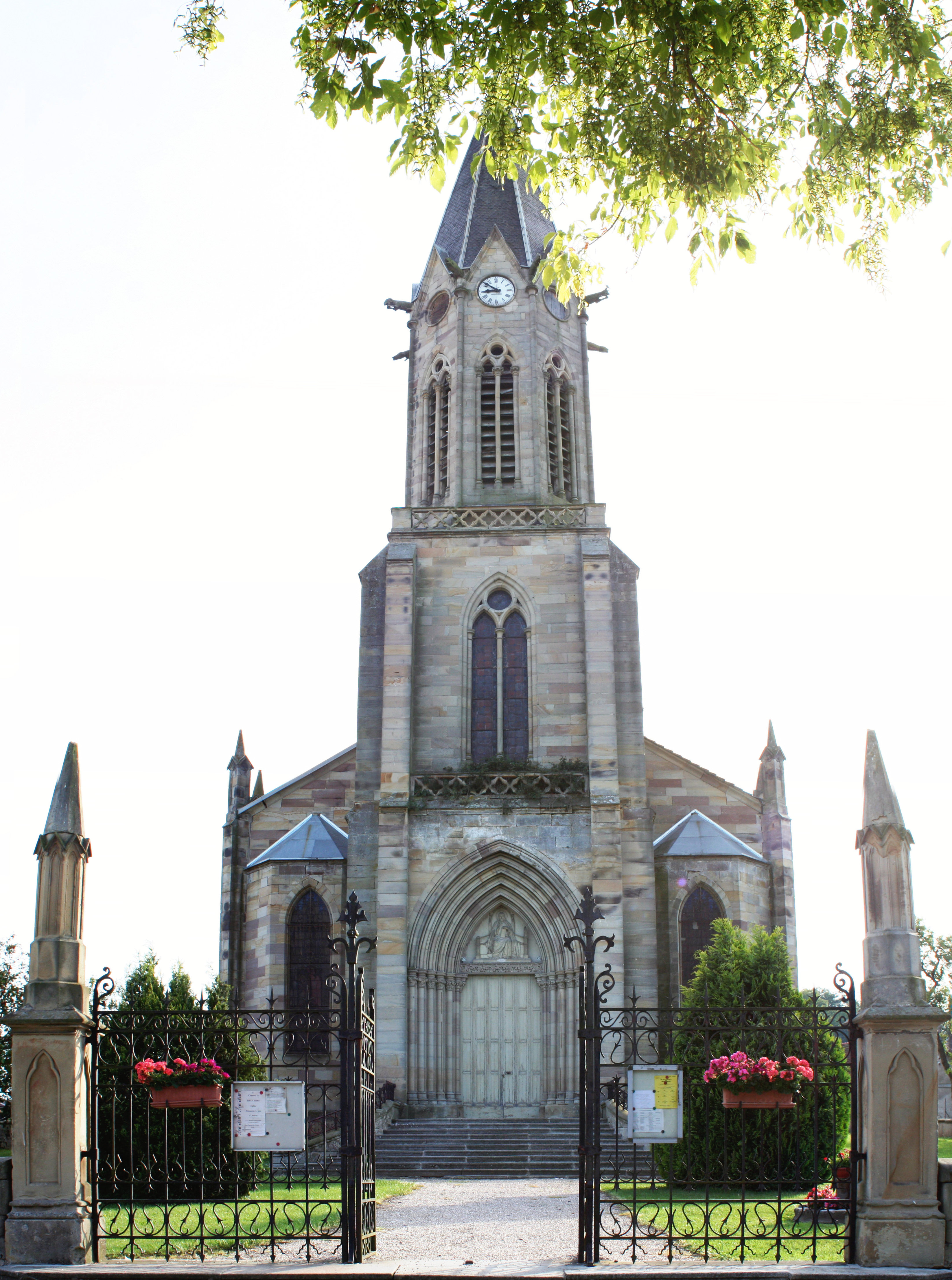 Clocher de l'église Sainte-Libaire de Padoux (Vosges)